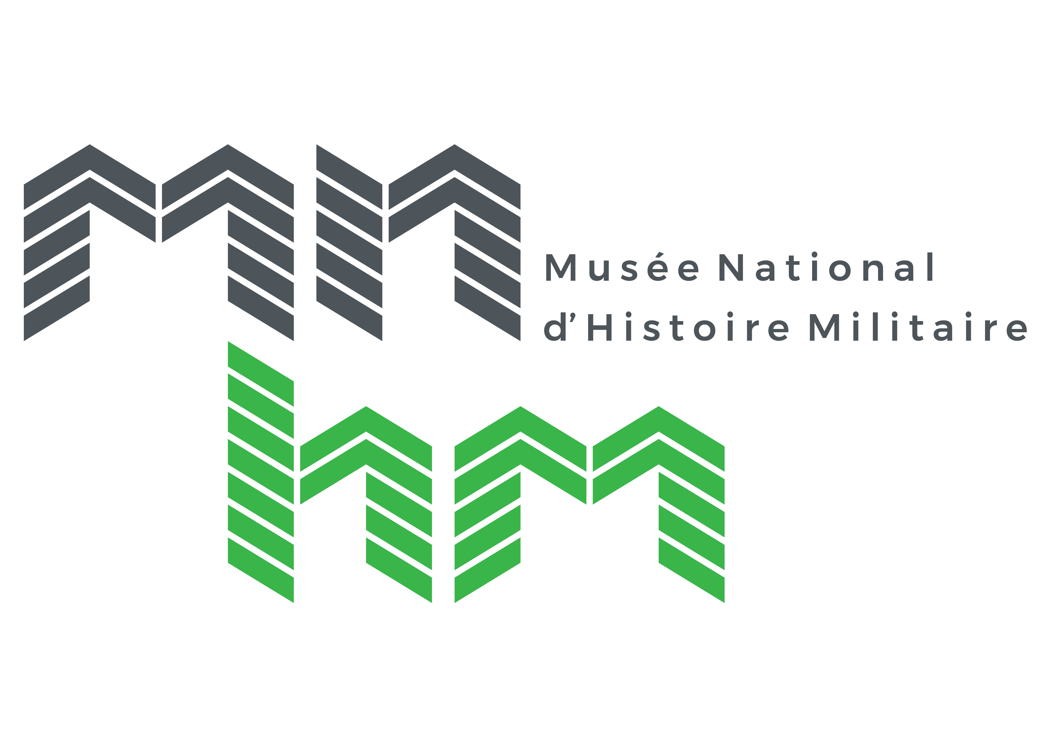 offizielles neues Logo des MNHM seit Anfang 2019